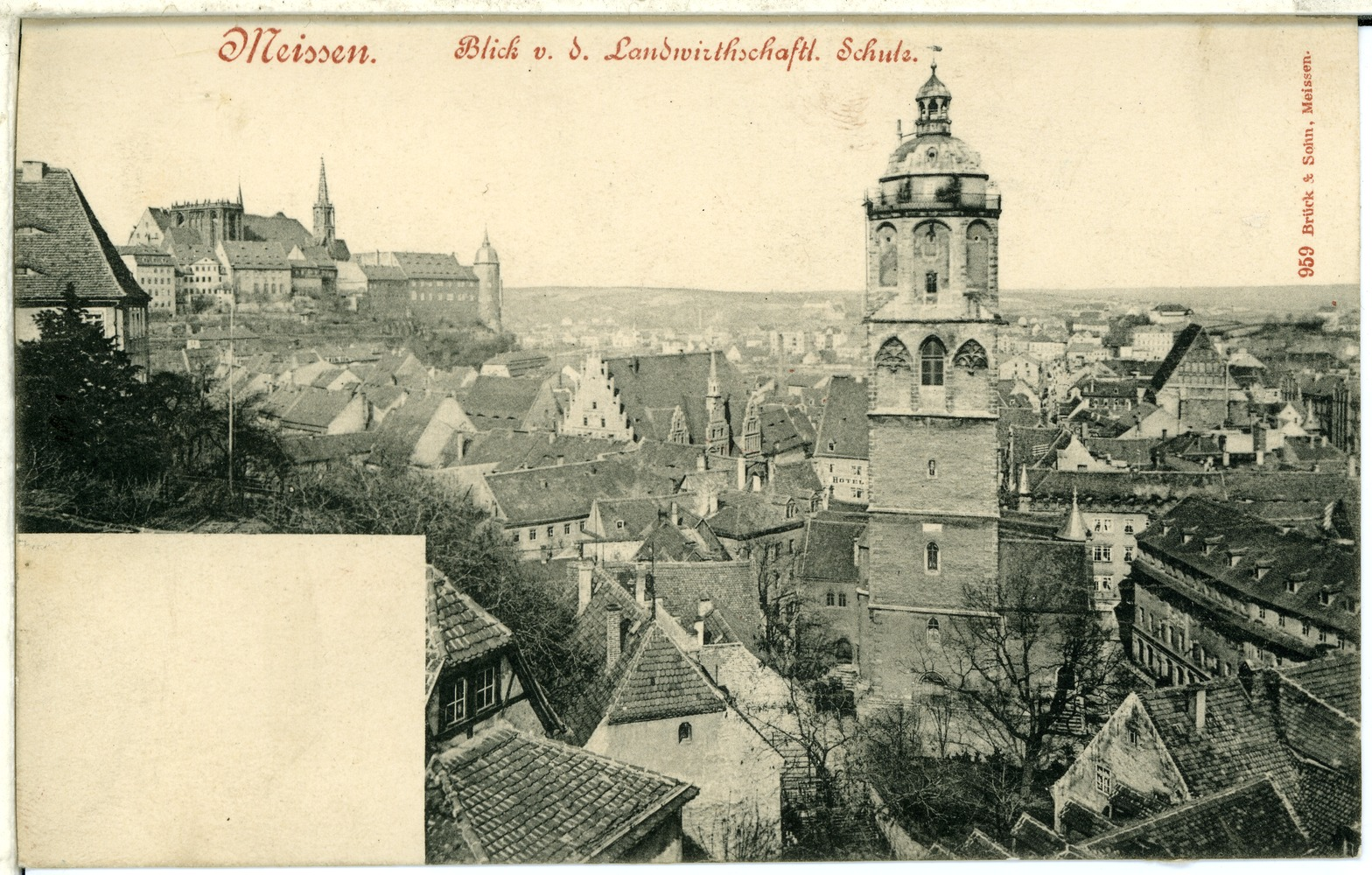 Meißen; Blick von der Landwirtschaftlichen Schule auf Kirche, Stadt und Burgberg This postcard is from publisher Brück & Sohn in Meißen ( postcard has a unique number 00959 and is available in a higher resolution at the publisher. This images was uploaded in a cooperation project between Wikipedians and the publisher.